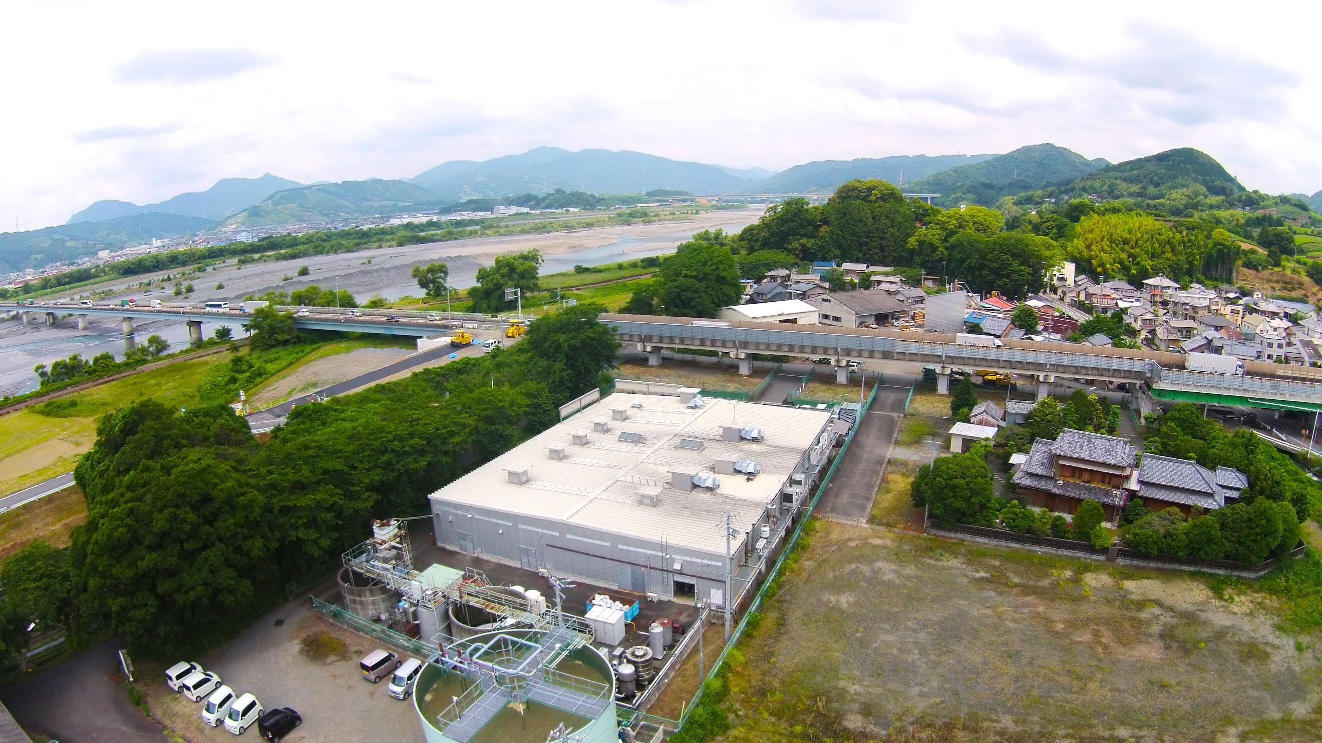 染野屋 静岡工場